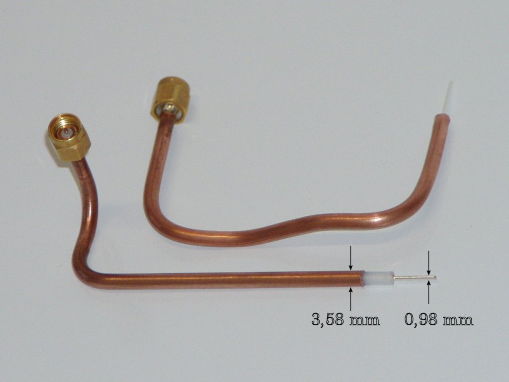 Semi-Rigid-Kabel mit einem Durchmesser des Außenleiters von 3,58 mm für Kleinsignalanwendungen bis 12 GHz und angelöteten SMA-Steckern